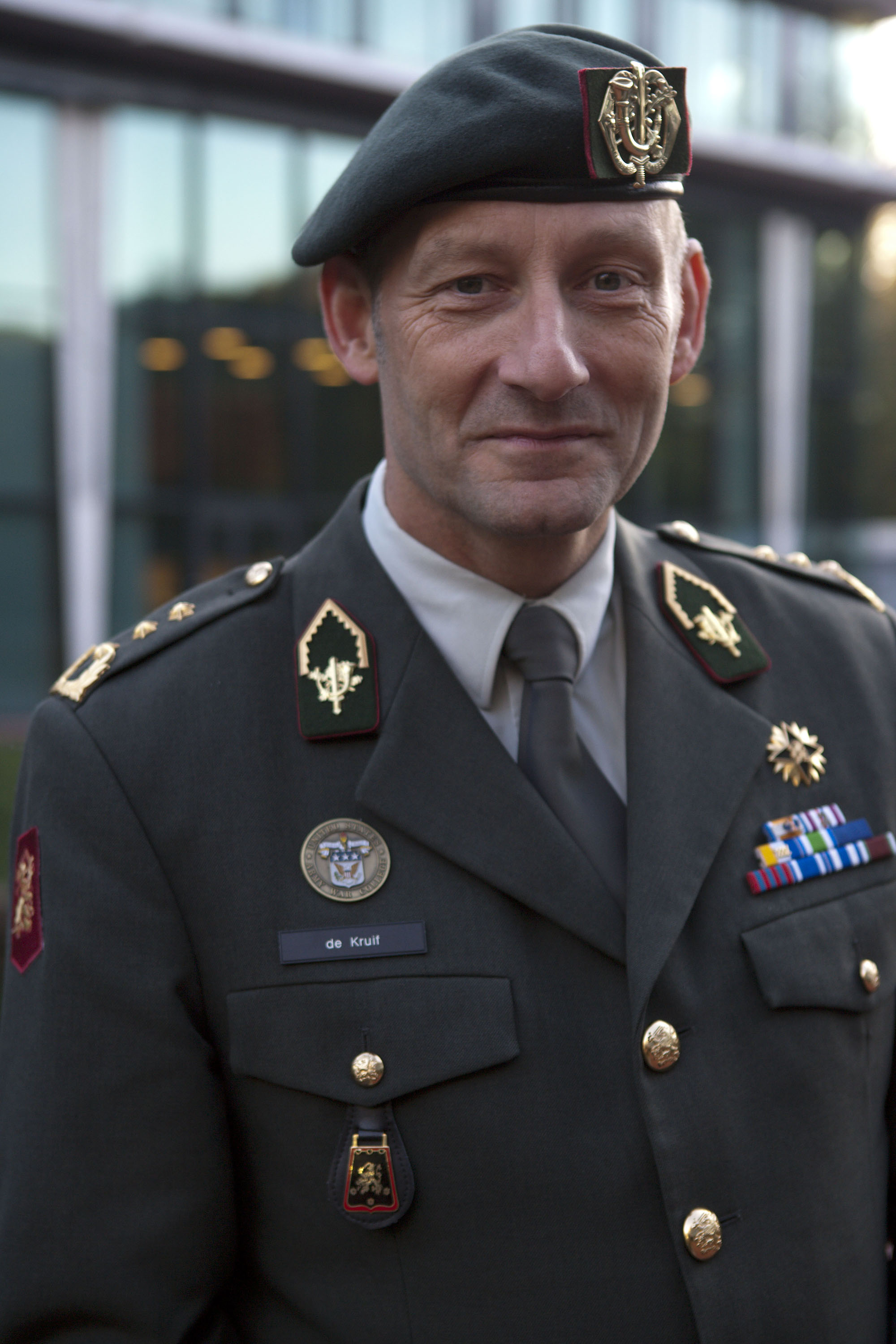 Commandant Landstrijdkrachten luitenant-generaal Mart de Kruif